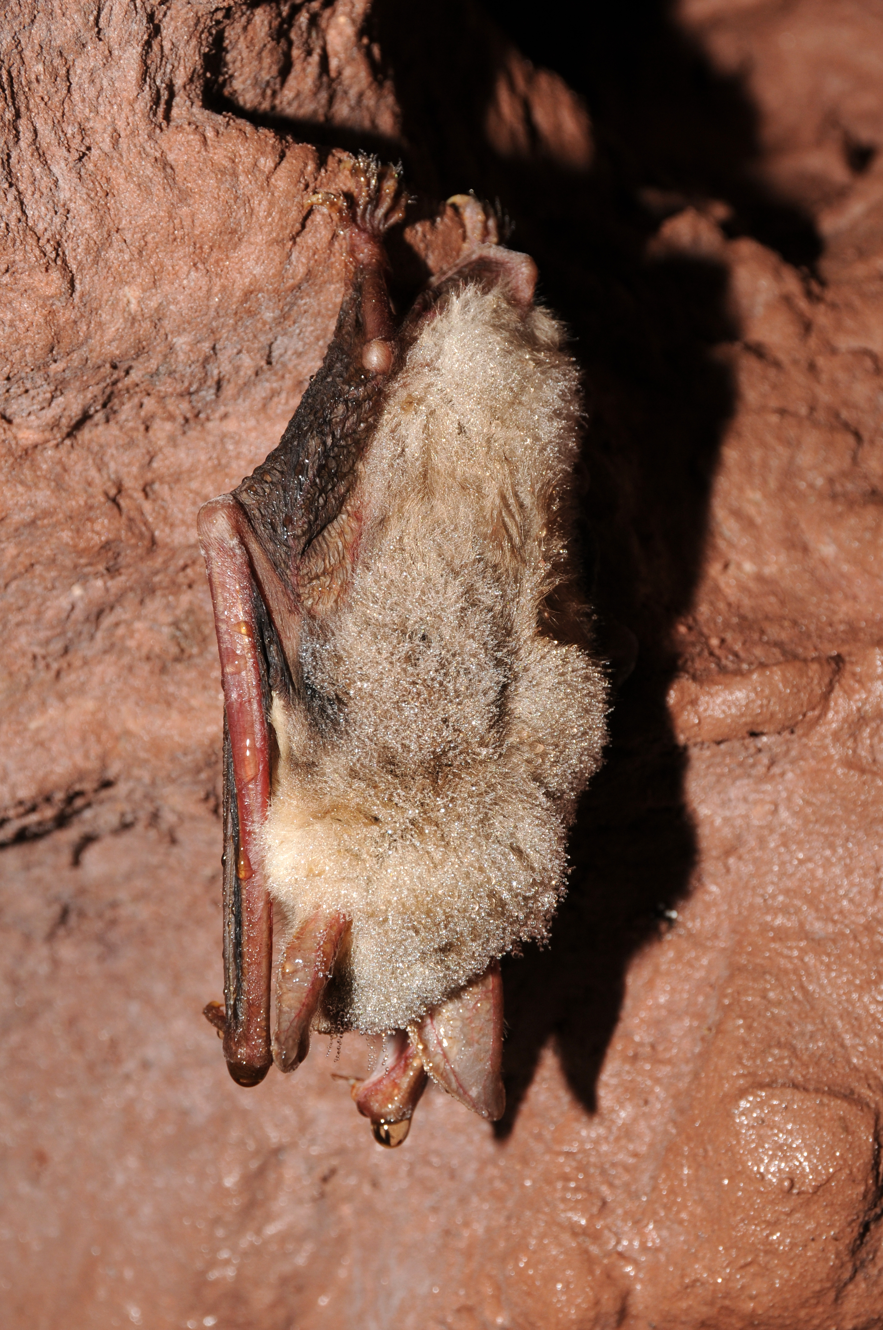 Chauve-souris.